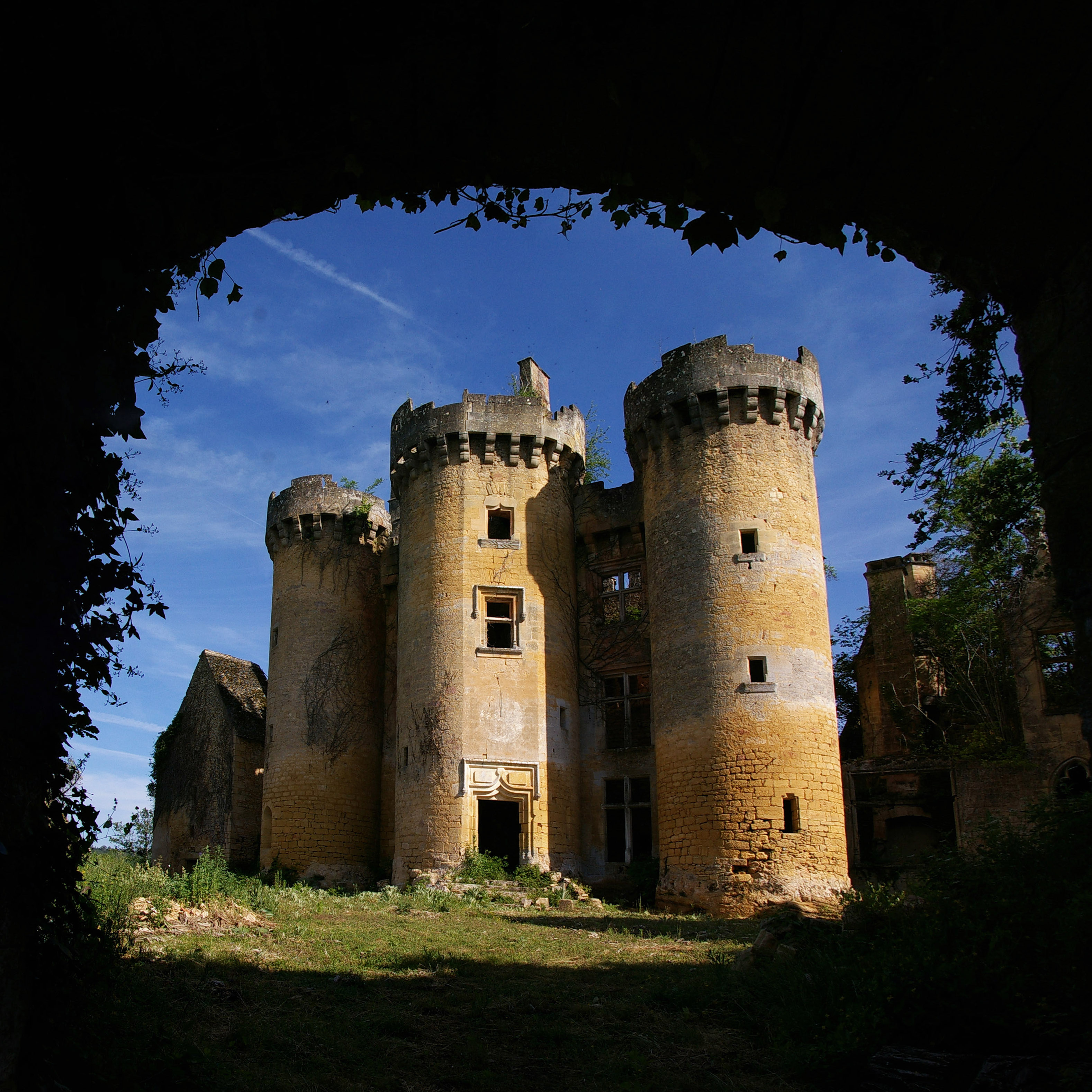 Château de Paluel, Saint-Vincent-le-Paluel